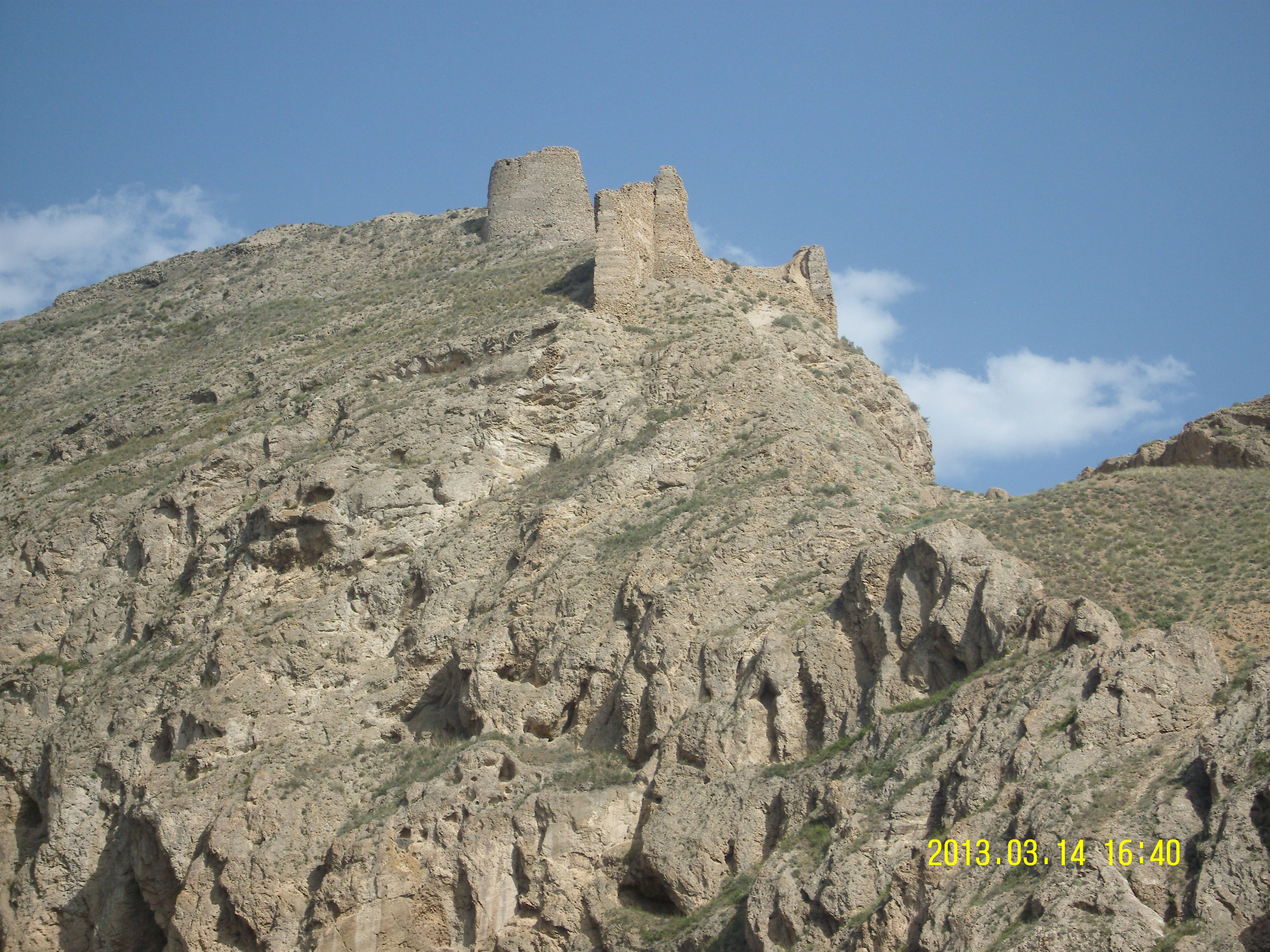 این عکس از منطقۀ تاریخی شبیرو شبر در رو بروی قلعۀ فیروزکوه ثبت شده است و برج وباروهای باقیماندۀ قلعۀ تاریخی فیروزکوه را بر فراز کوهی به همین نام در شهر فیروزکوه از شهرهای استان تهران نشان می دهد(احمدیزدانی)